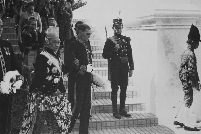 foto. Gouverneur Bijleveld en Sultan Hamengkoe Boewono VIII lopen gearmd, voorafgegaan door een vrouwelijke lijfwacht, tijdens een bezoek van de gouverneur aan de Kraton van de Sultan van Jogjakarta